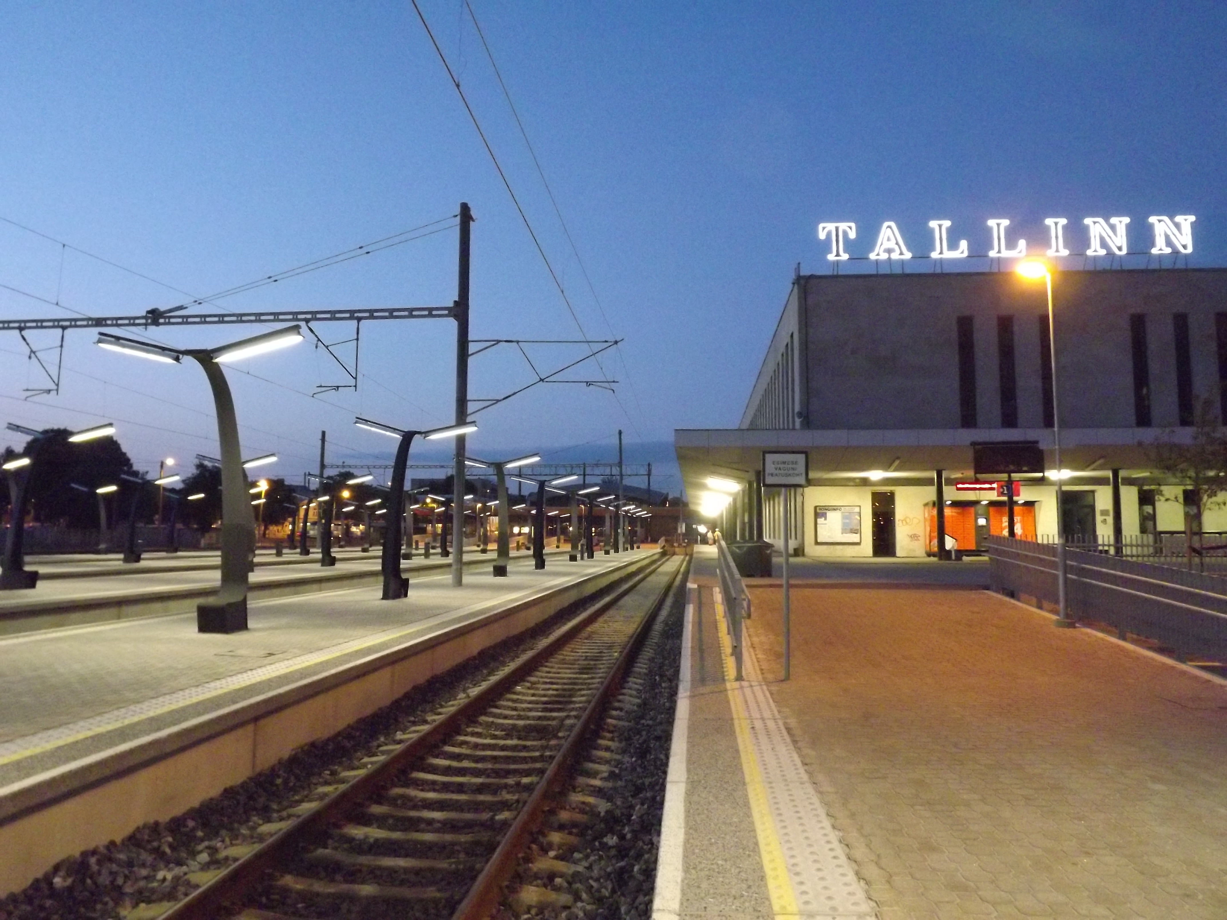 Balti jaam õhtul